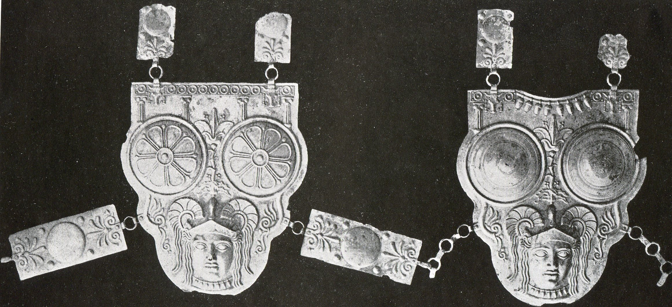 Cuirasse de bronze découverte à Ksour Essaf, Tunisie, catalogue du Musée Alaoui (Musée national du Bardo, Tunisie)